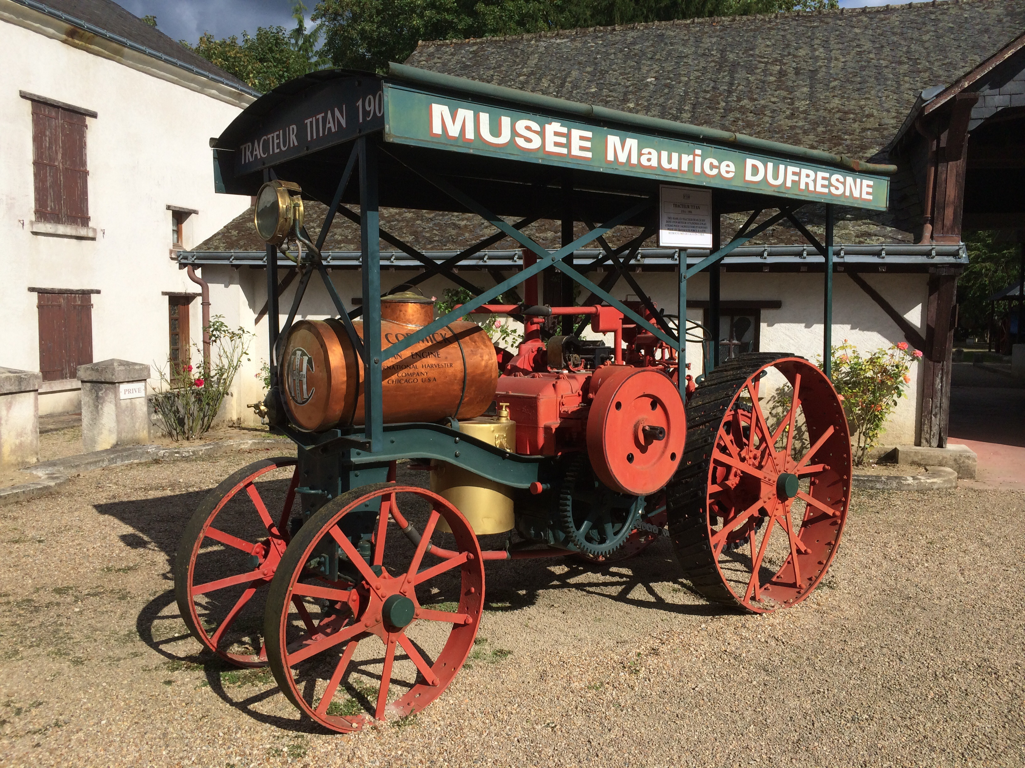 Tracteur titan des années 1900. (1900 à 1909 ?) portant le nom du musée Maurice Dufresne. Il est situé juste avant l'entrée de la partie recouverte du musée Maurice Dufresne.p